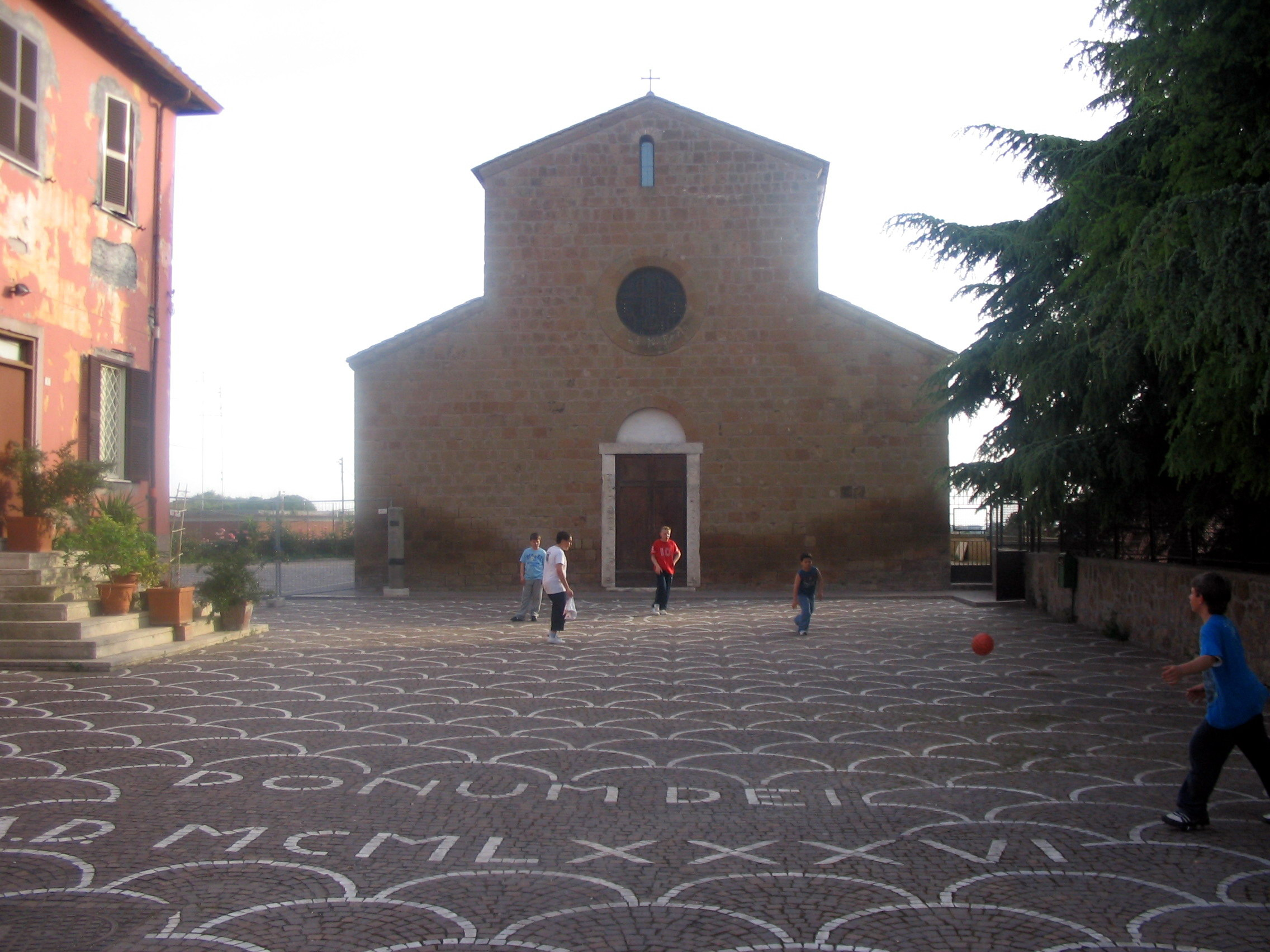 Ardea, Lazio